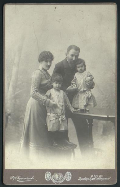 Димитър Карастоянов със семейството си.